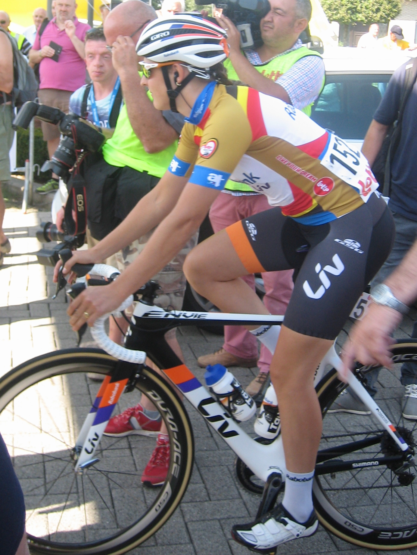 Start van de 2e etappe van de Lotto Belgium Tour 2016 in Lierde.